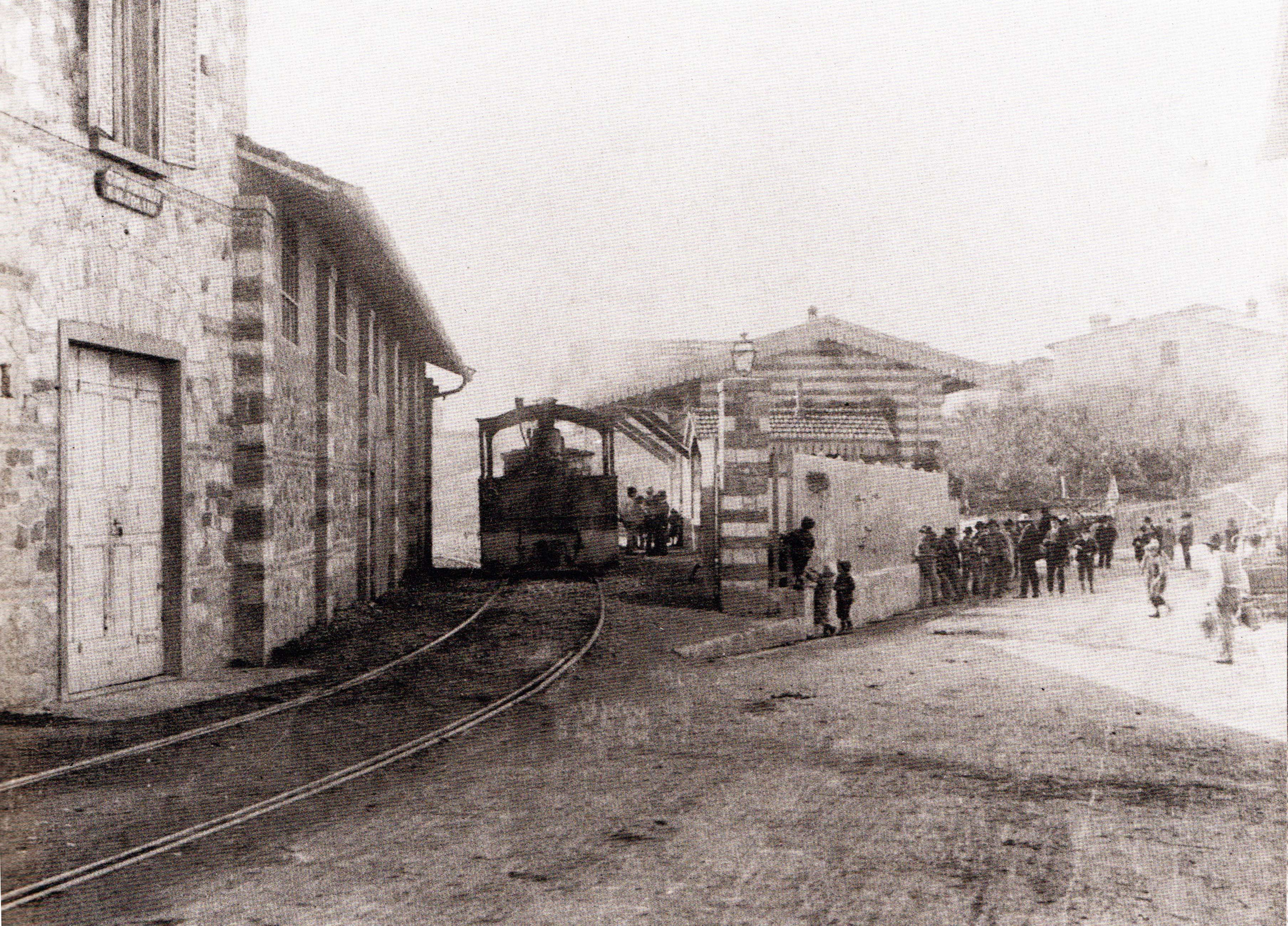 Convoglio tranviario in partenza dalla stazione di San Casciano in Val di Pesa